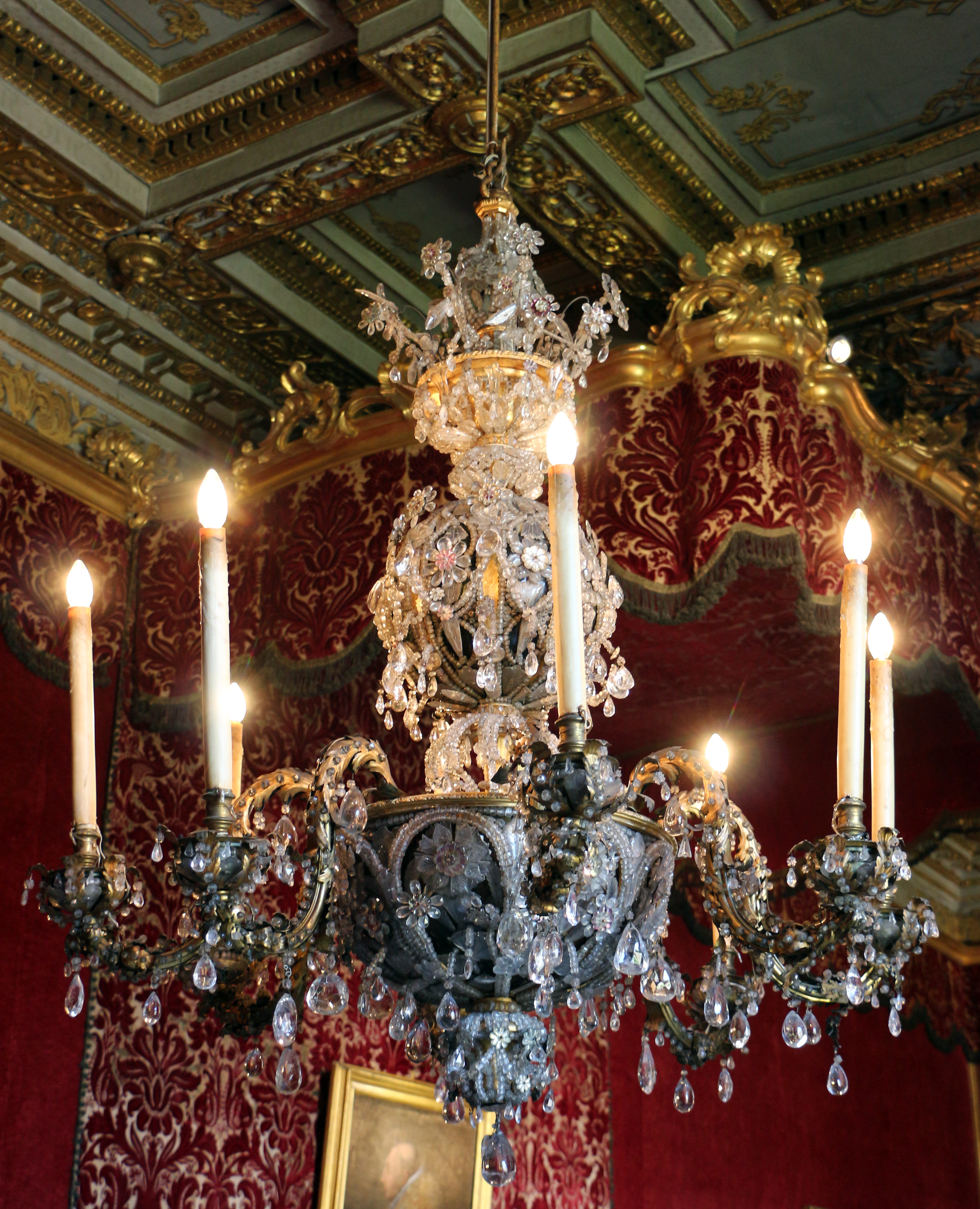 Palazzo colonna, sala del trono, lampadario settecentesco in cristallo di boemia.JPG